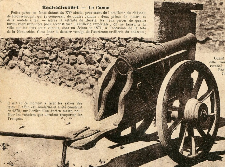 canon de rochechouart et son histoire